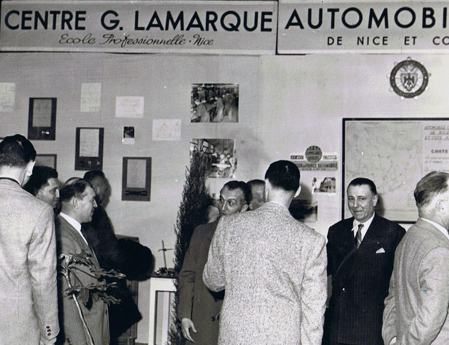 Stand du centre d'apprentissage "Georges Lamarque" au Palais des Expositions à Nice (Alpes Maritimes) le jour de l'inauguration du salon de l'automobile avec la présence de son directeur-fondateur Marcel Payan (1909-2006), de l'Inspecteur de l'enseignement technique, du président de la Chambre de l'industrie automobile...